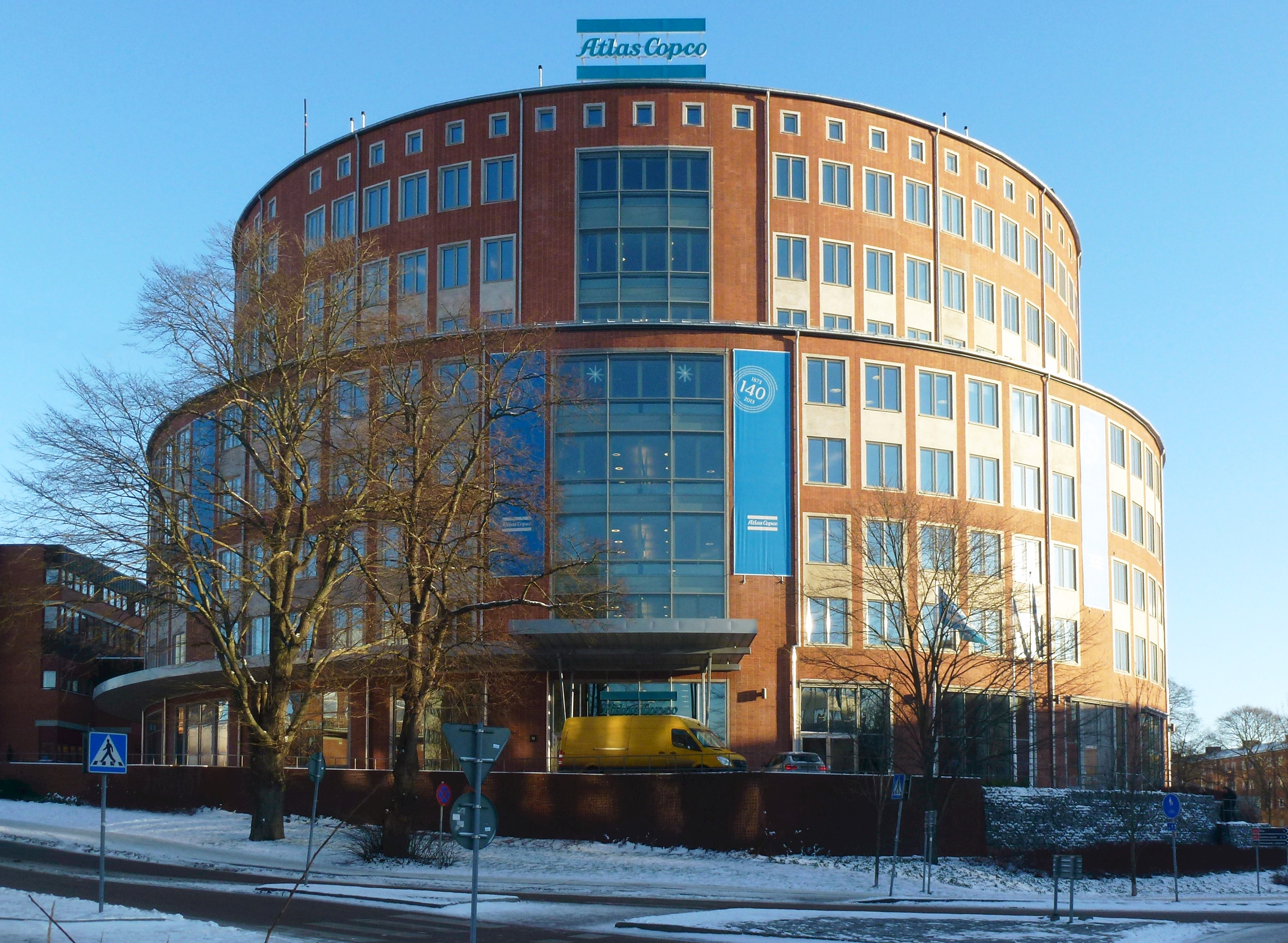 Atlas Copco huvudkontor